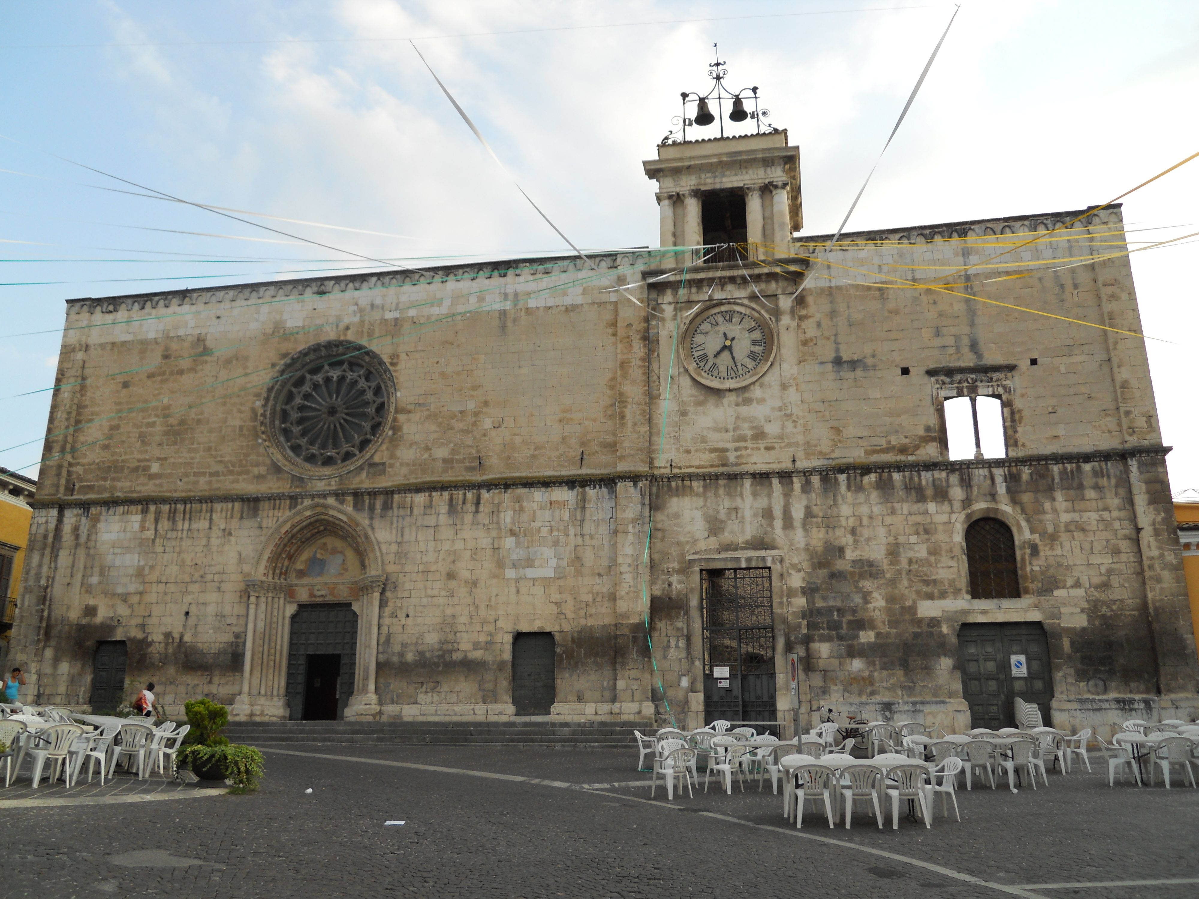 Chiesa di Santa Maria della Tomba di Sulmona